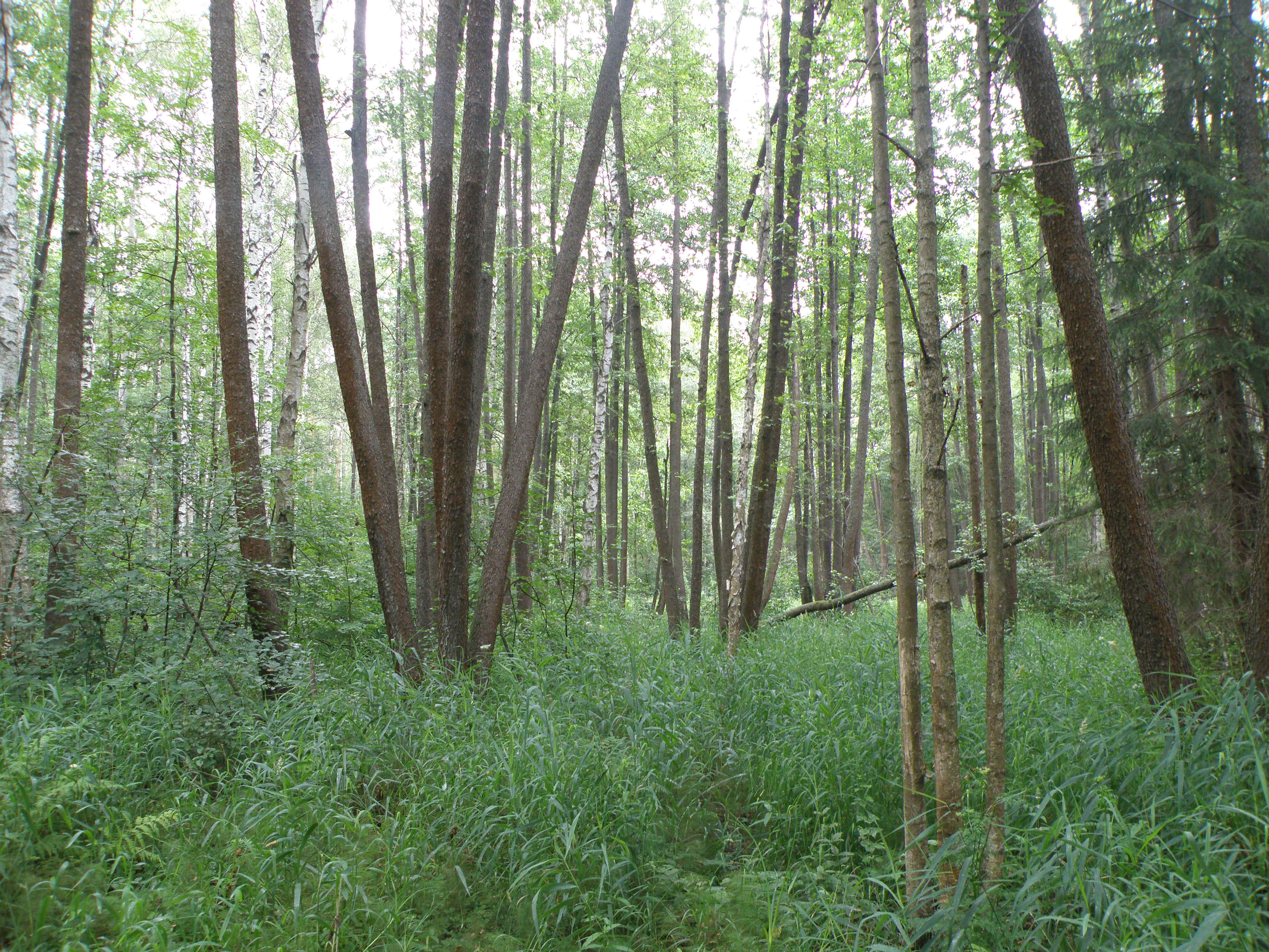 Черноольшаник в пойме Бочки